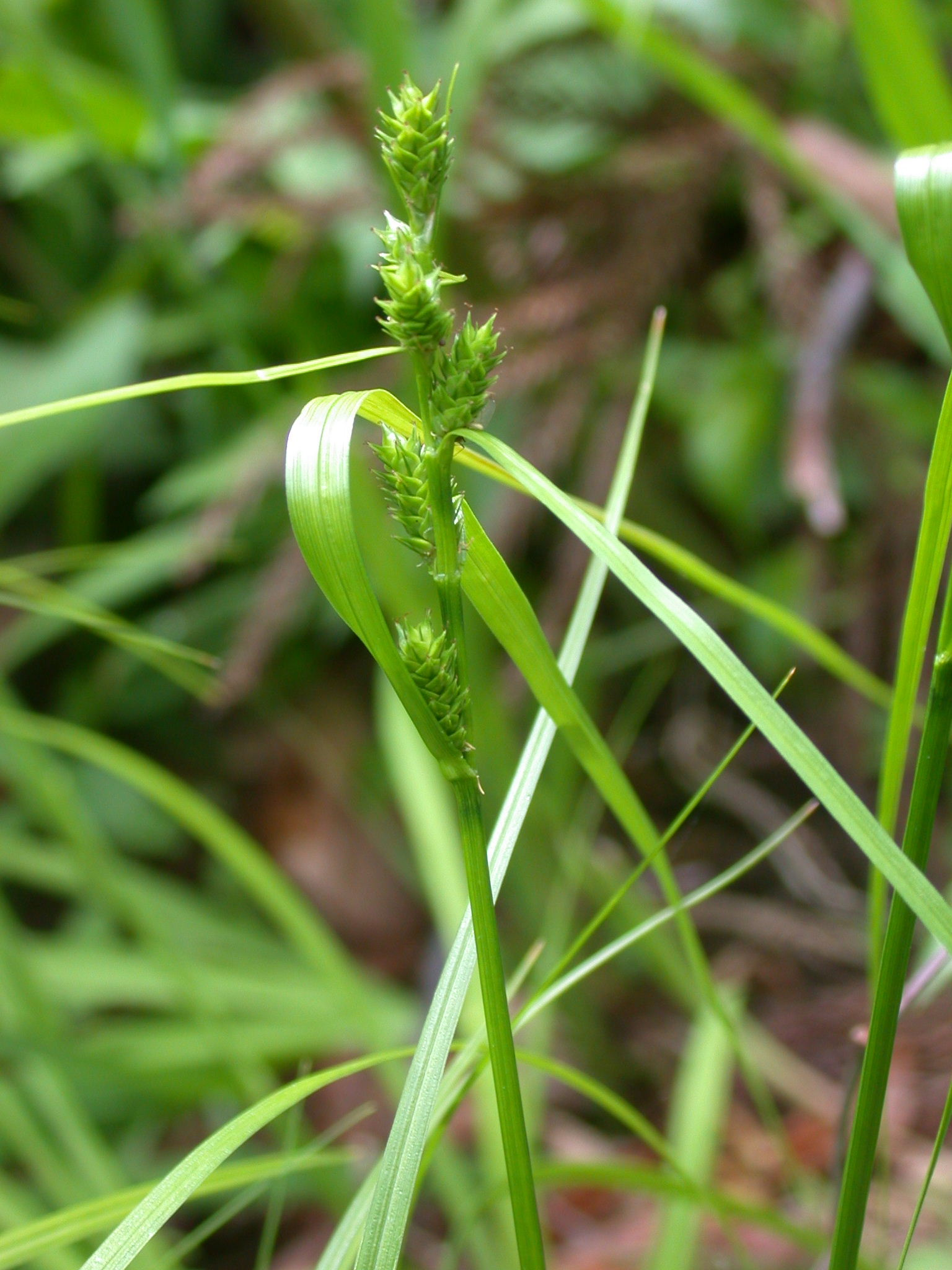 Carex gibba (Cyperaceae) Japanese name;Masukusa date:2007.05.03:Kozagawa town,Wakayama pref.Japan Author;Keisotyo